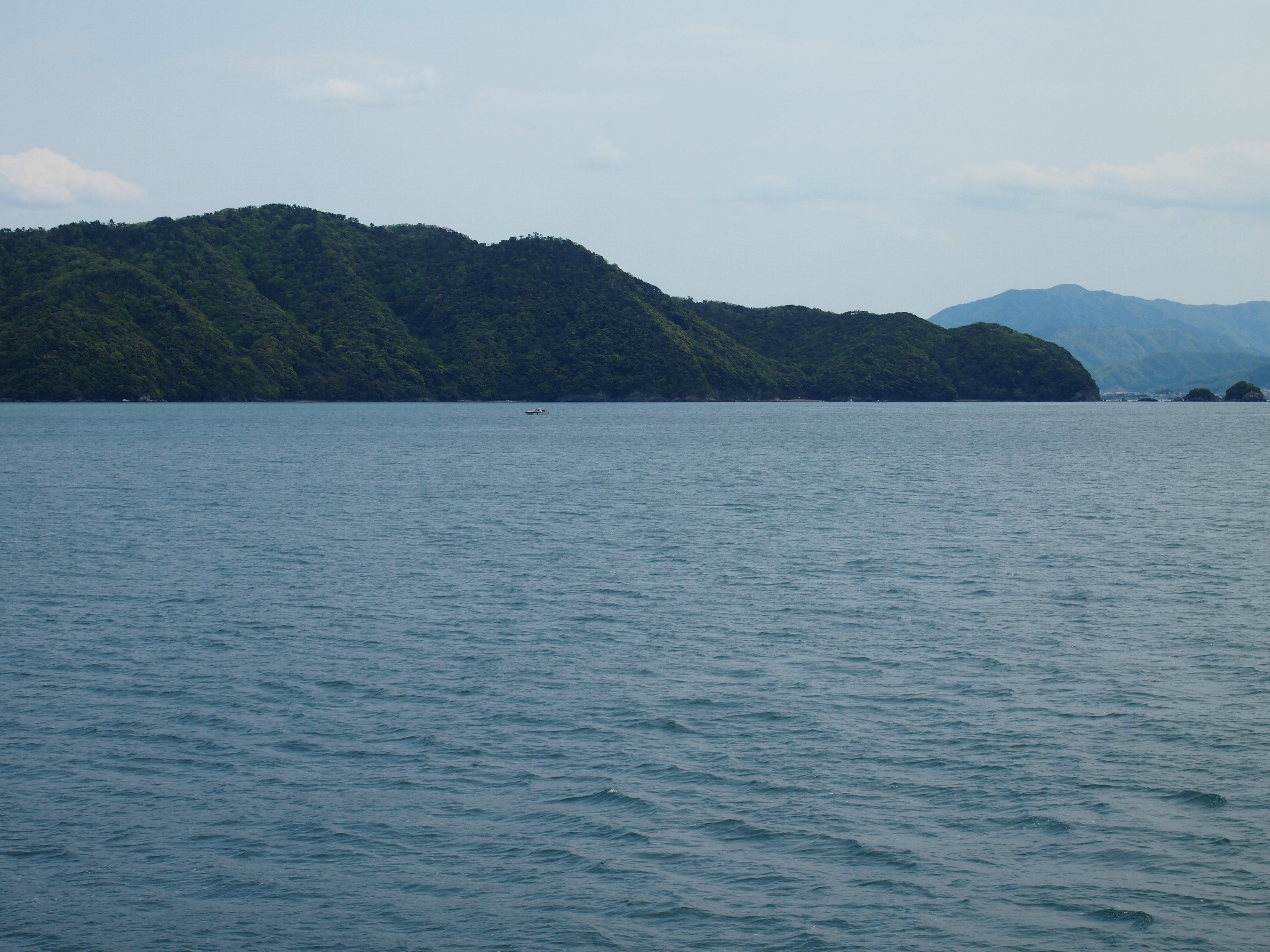 福井県内外海半島の双児崎を蘇洞門めぐり遊覧船から望む。